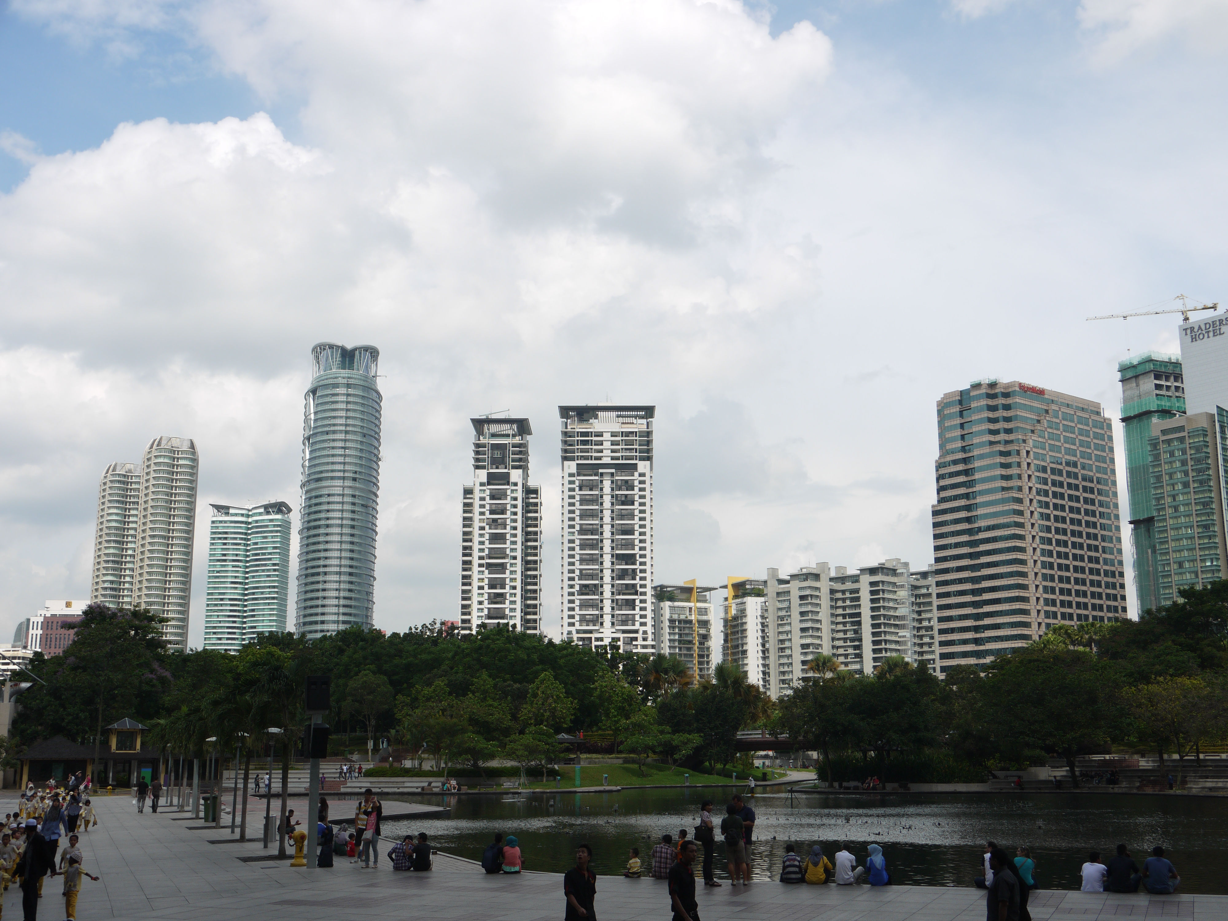 KLCC Park